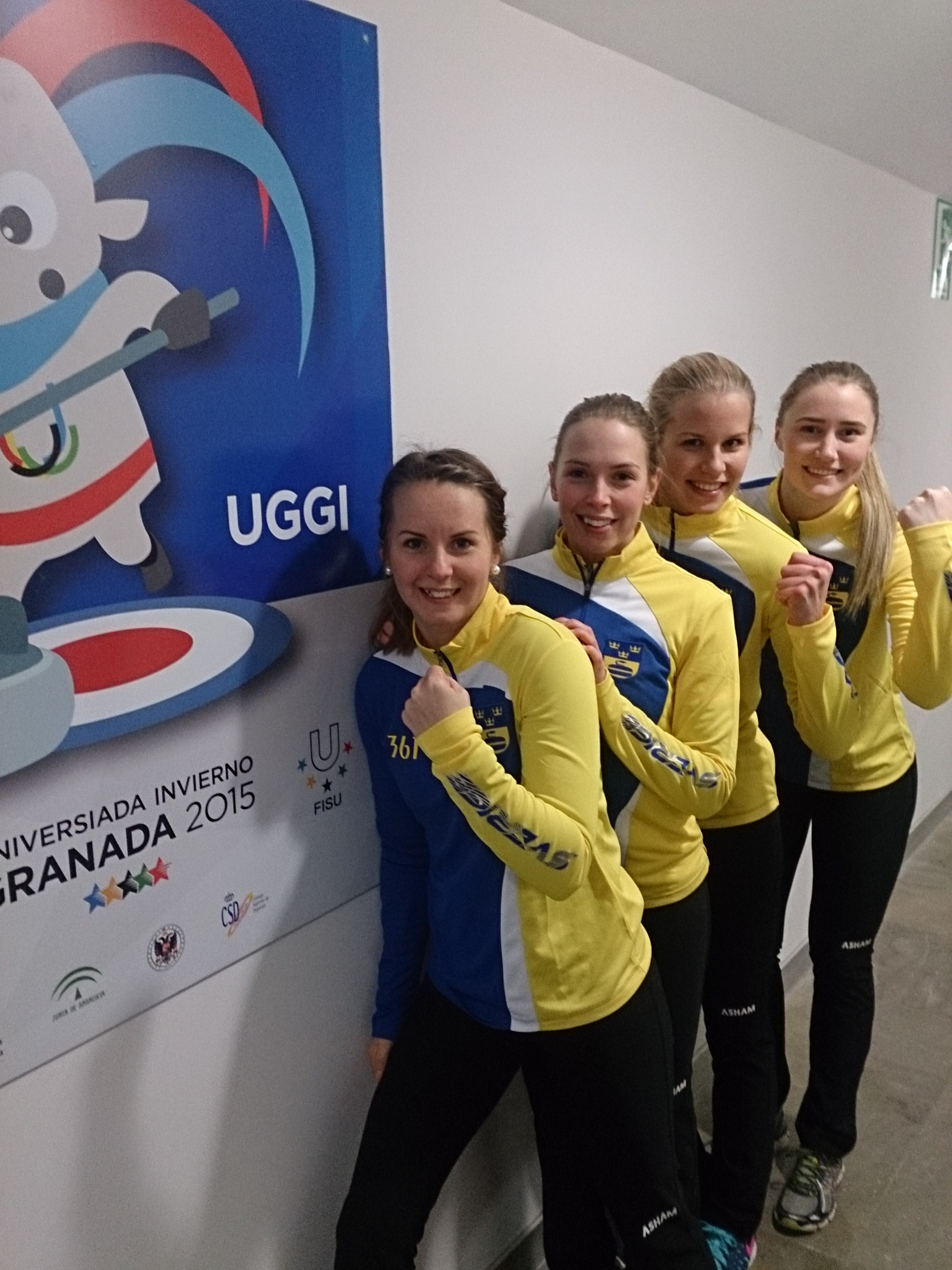 Team Swedens damcurlare på Universiaden i Granada 2015. I lag McManus ingår: Anna Huhta, Gävle Sofia Mabergs, Härnösand Cecilia Östlund, Karlstad Sara McManus, Gävle